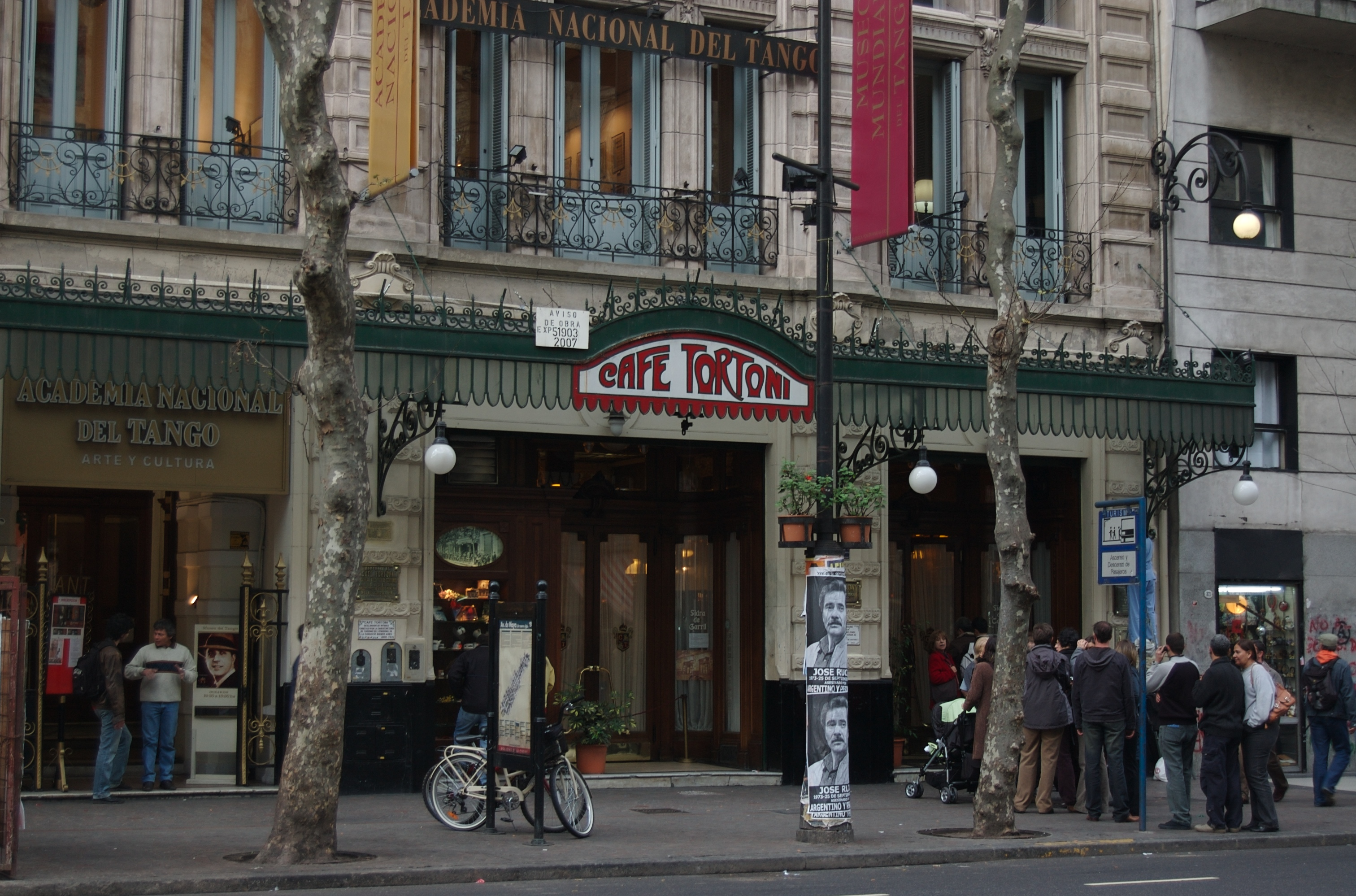 Café Tortoni, Avenida de Mayo 825, Buenos Aires, Argentina.